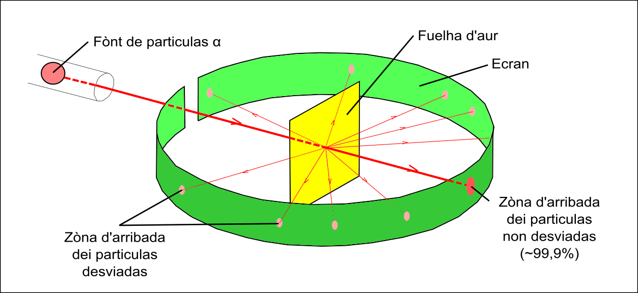 Esquèma generau de l'experiéncia de Rutherford.